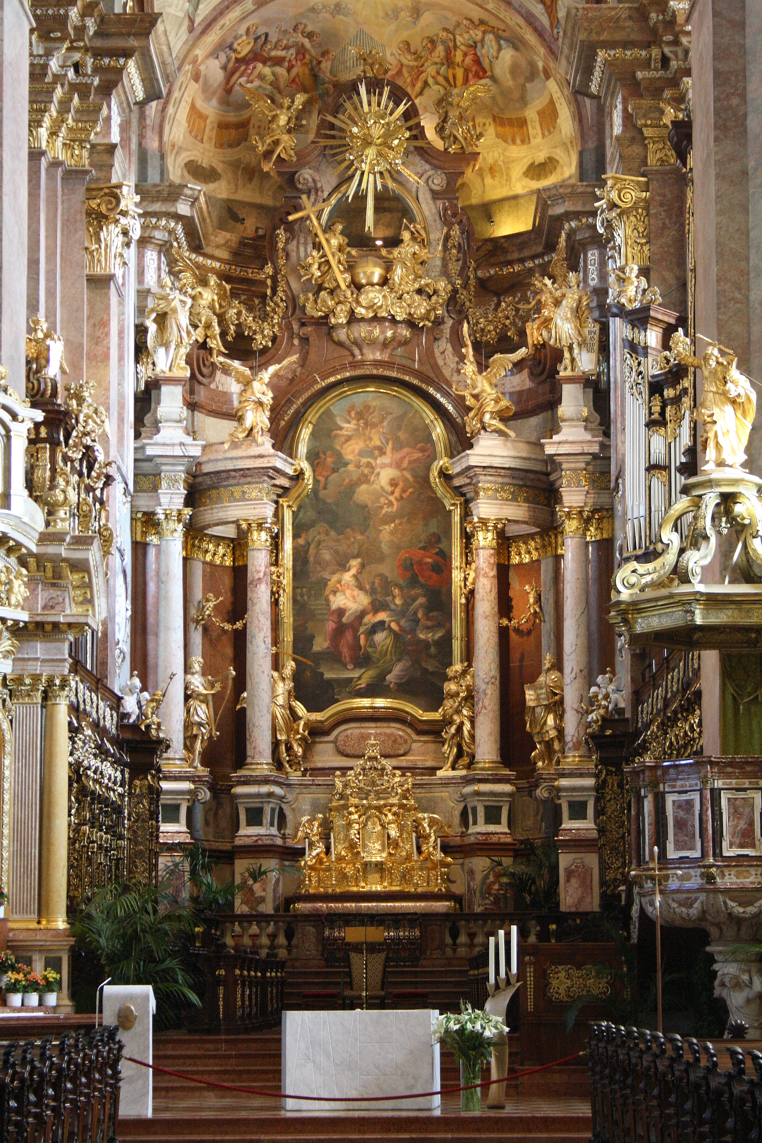 Der Hochaltar in der Stiftskirche Klosterneuburg in Niederösterreich vom Salzburger Steinmetz Sebastian Stumpfegger nach einem Entwurf von Matthias Steinl.